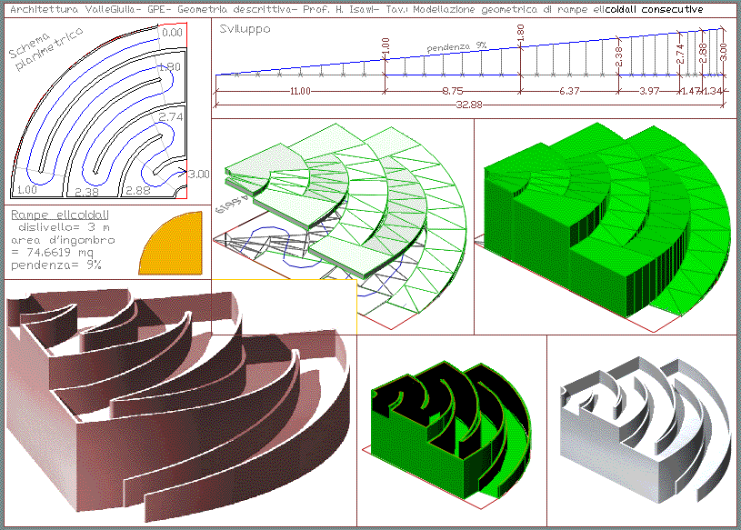 modellazione geometrica di una rampa elicoidale cilindrica e circolare